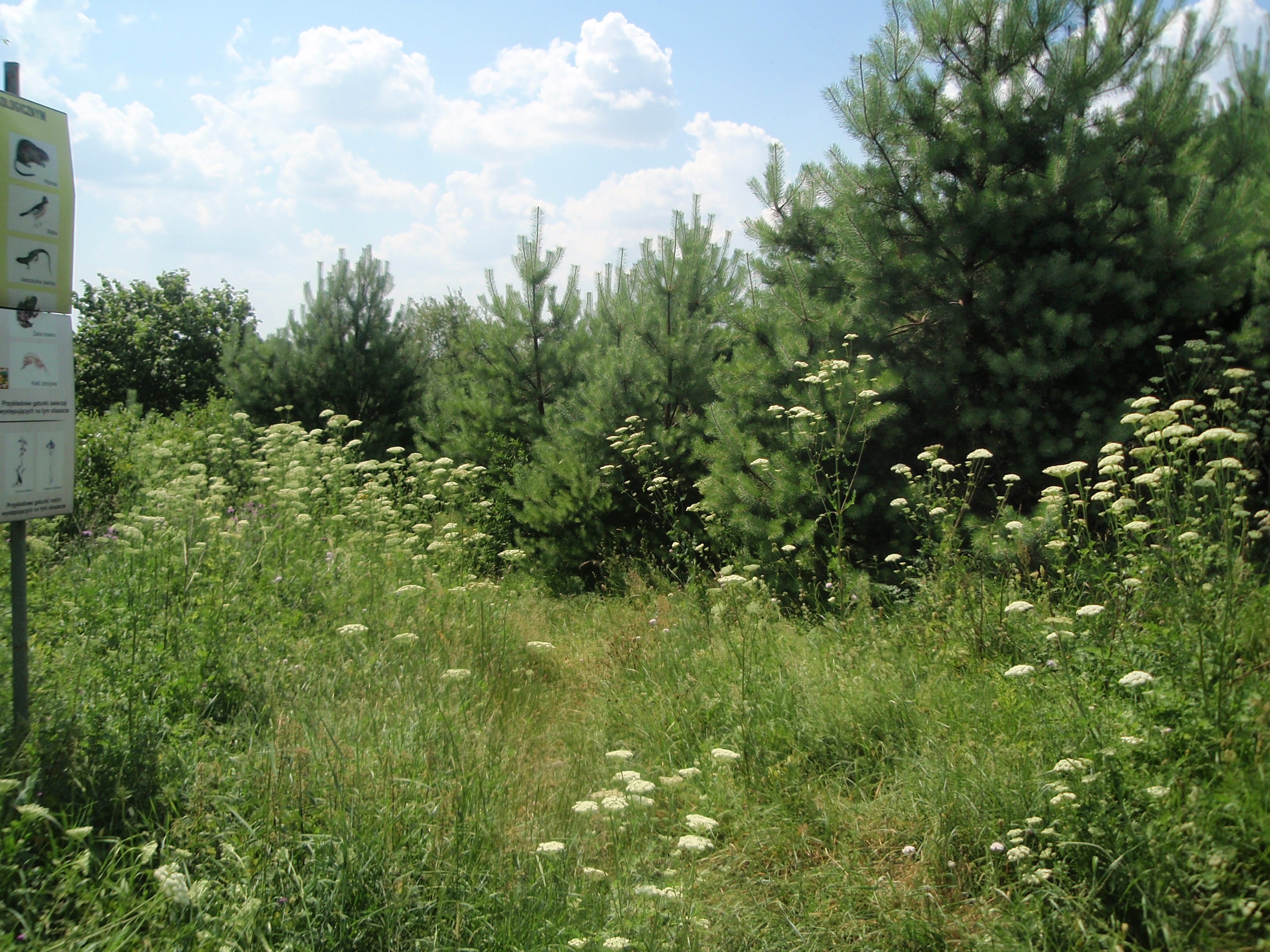 Użytek ekologiczny "Zródliska w Zakawiu" w Dąbrowie Górniczej